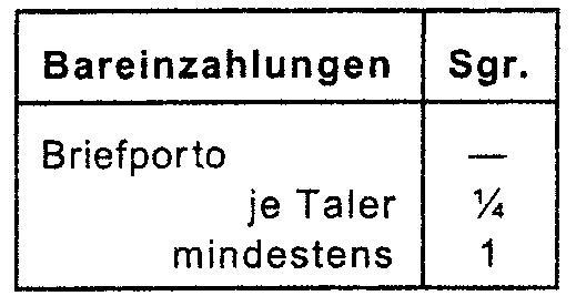 1852 in Preußen, Geldüberweisung durch bare Einzahlung auf einen Brief